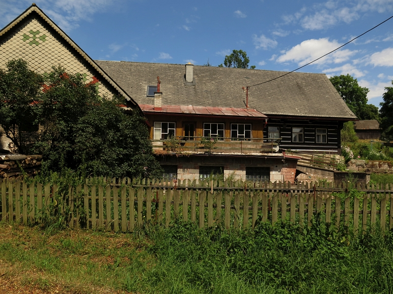 Usedlost čp. 33, Svojek 33, Svojek.